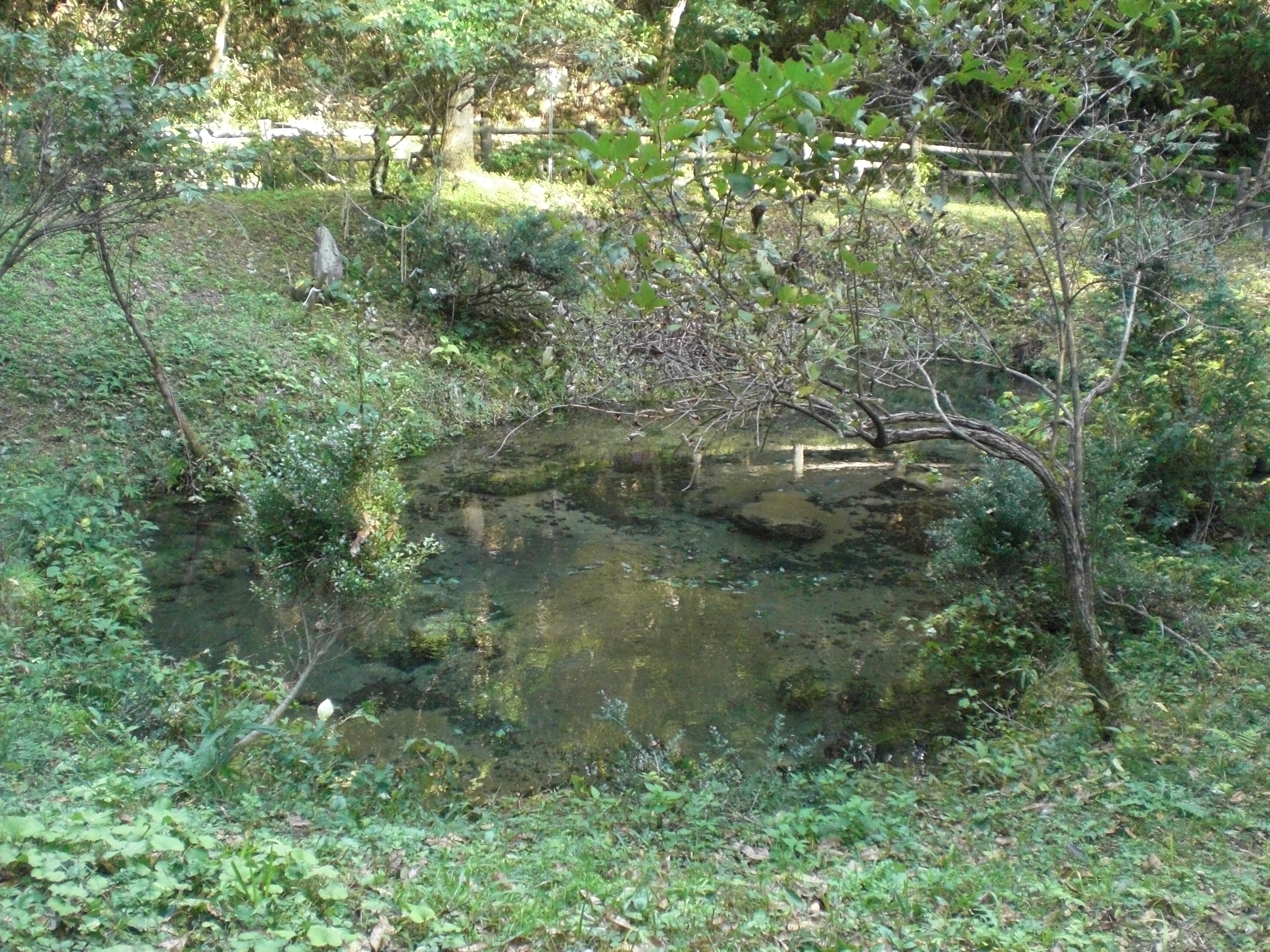 蒜山高原にある塩釜の冷泉